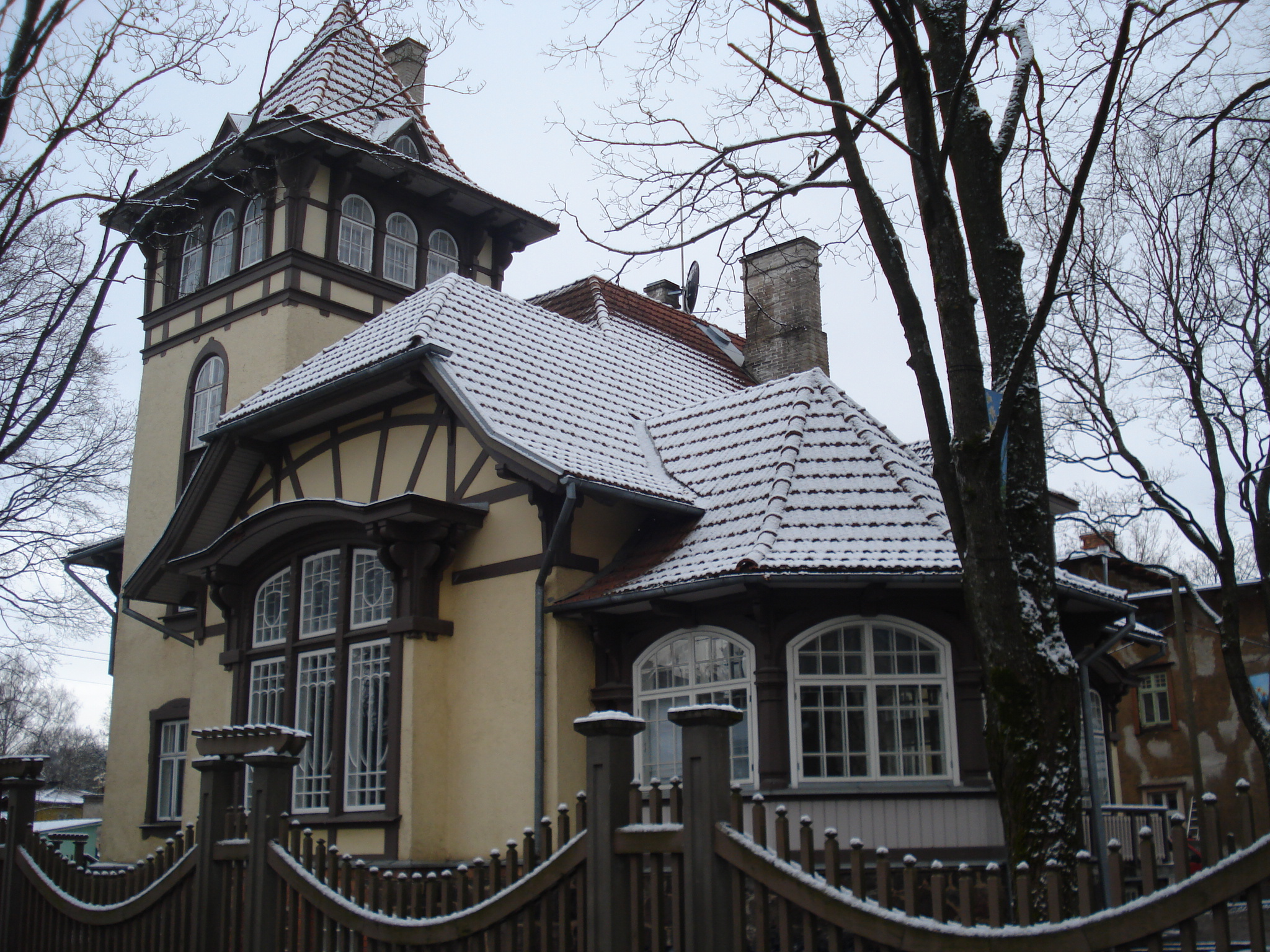 Deutsches Kulturinstitut. Tartu, Kastani 1Eʋegbe: Saksa kultuuri instituut. Tartu, Kastani 1